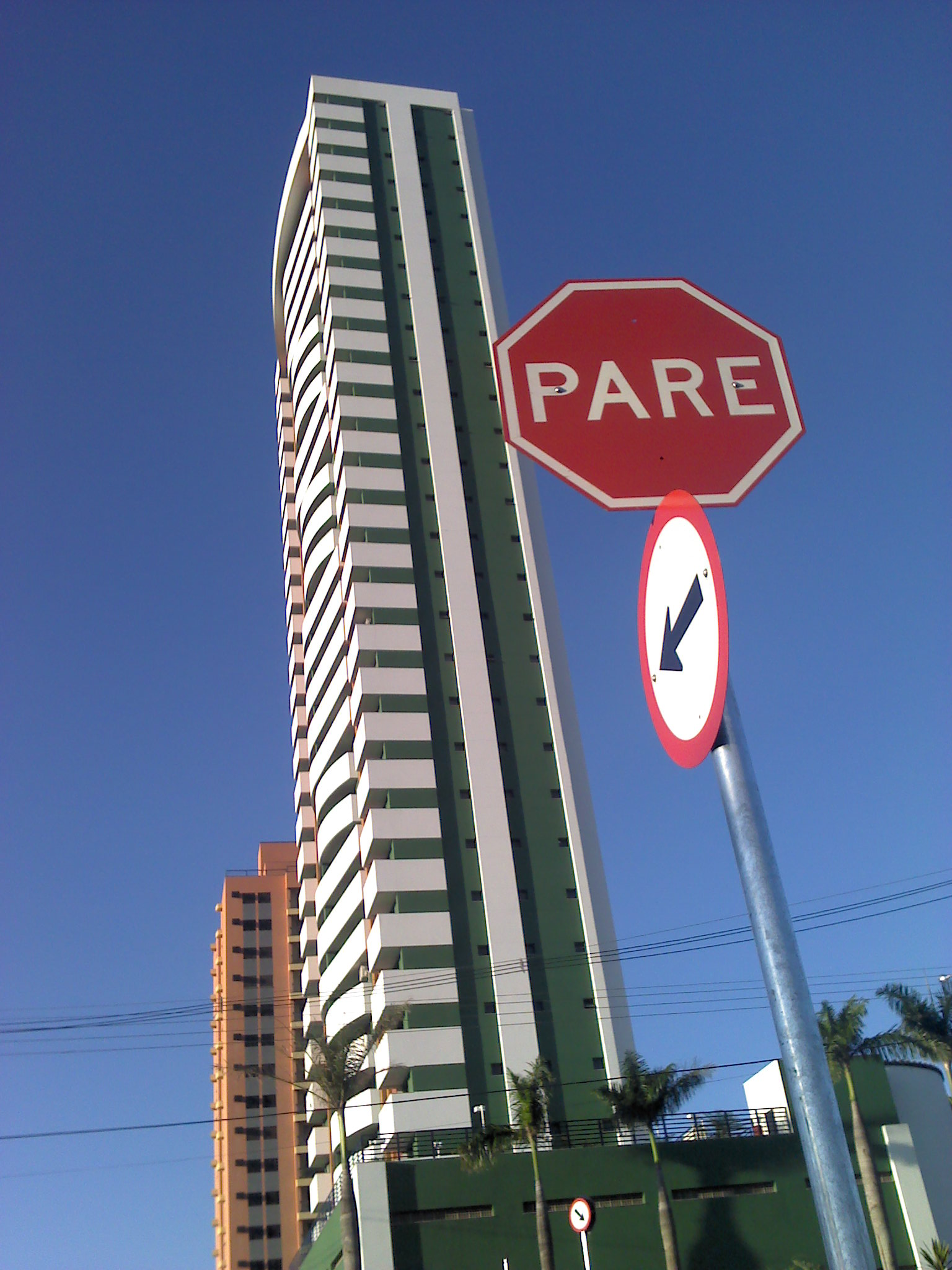 Placa de pare e prédio ao fundo